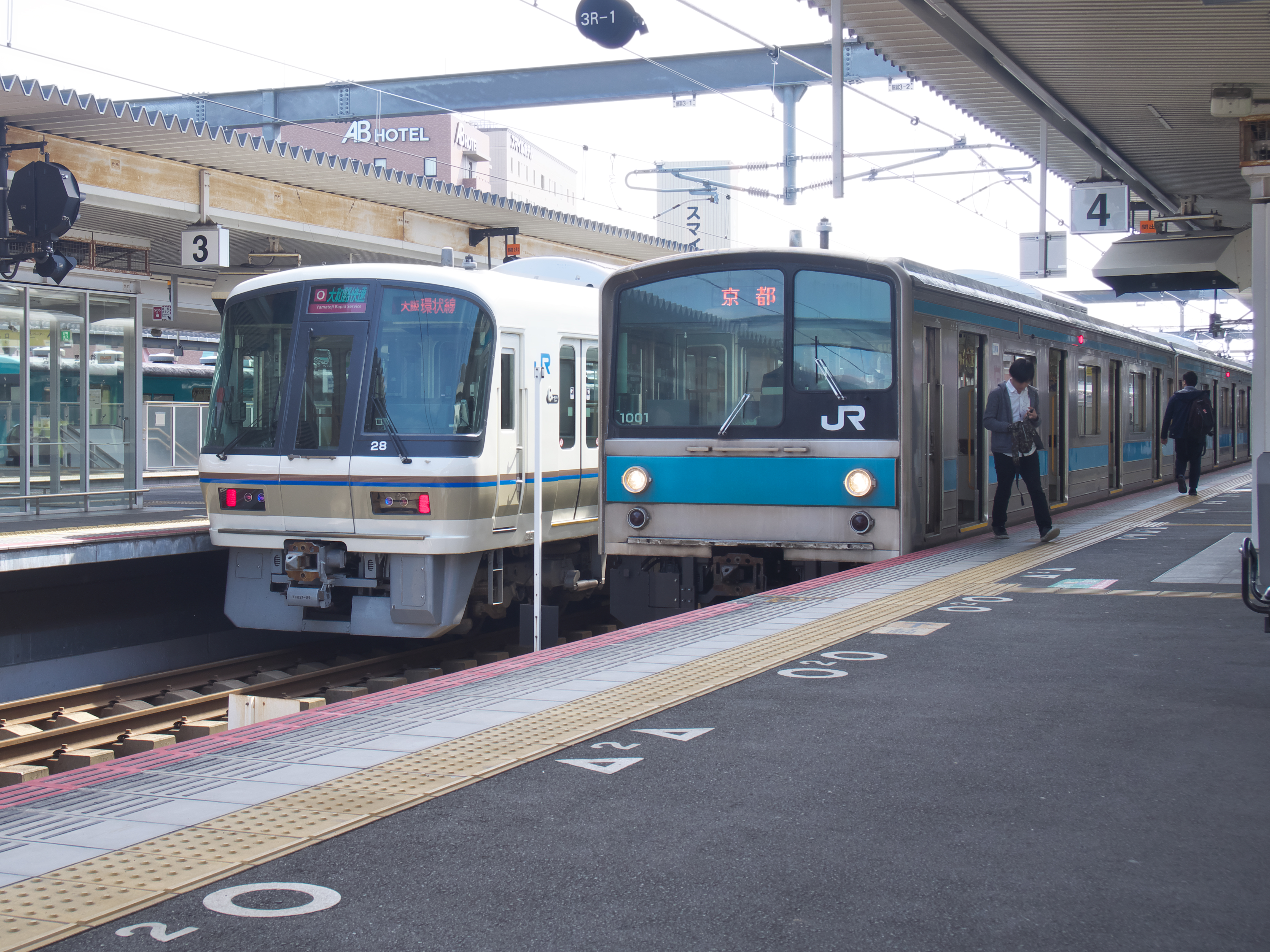 奈良駅で撮影。